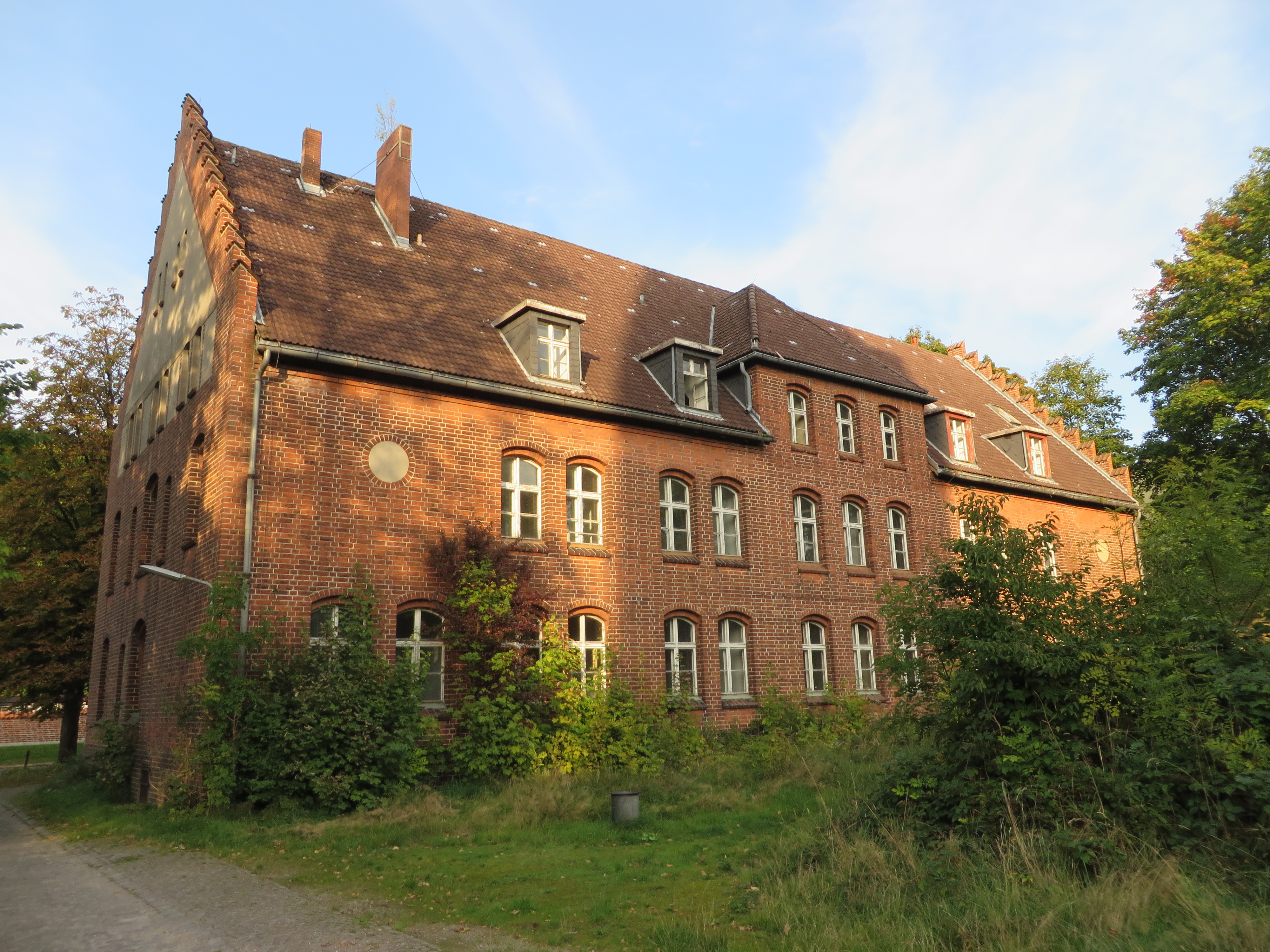 Vorburg der Marine-Burg, Marinelazarett Mürwik, Verwaltungsgebäude (Das Gebäude vorne an der Straße)